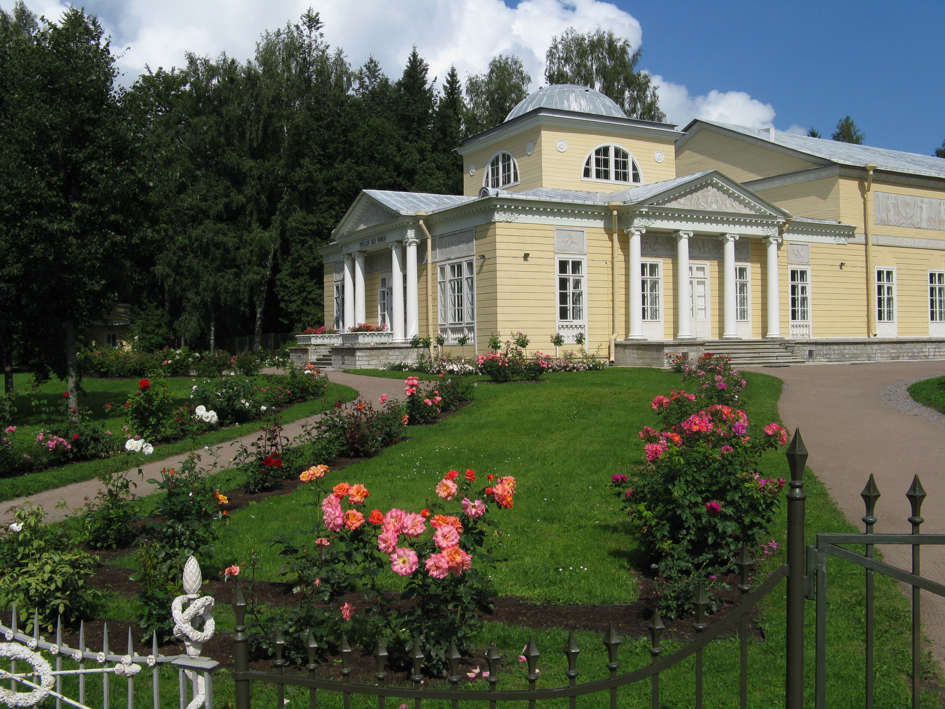 Розовый павильон (Санкт-Петербург и Лен. область, Павловск, Белая береза).